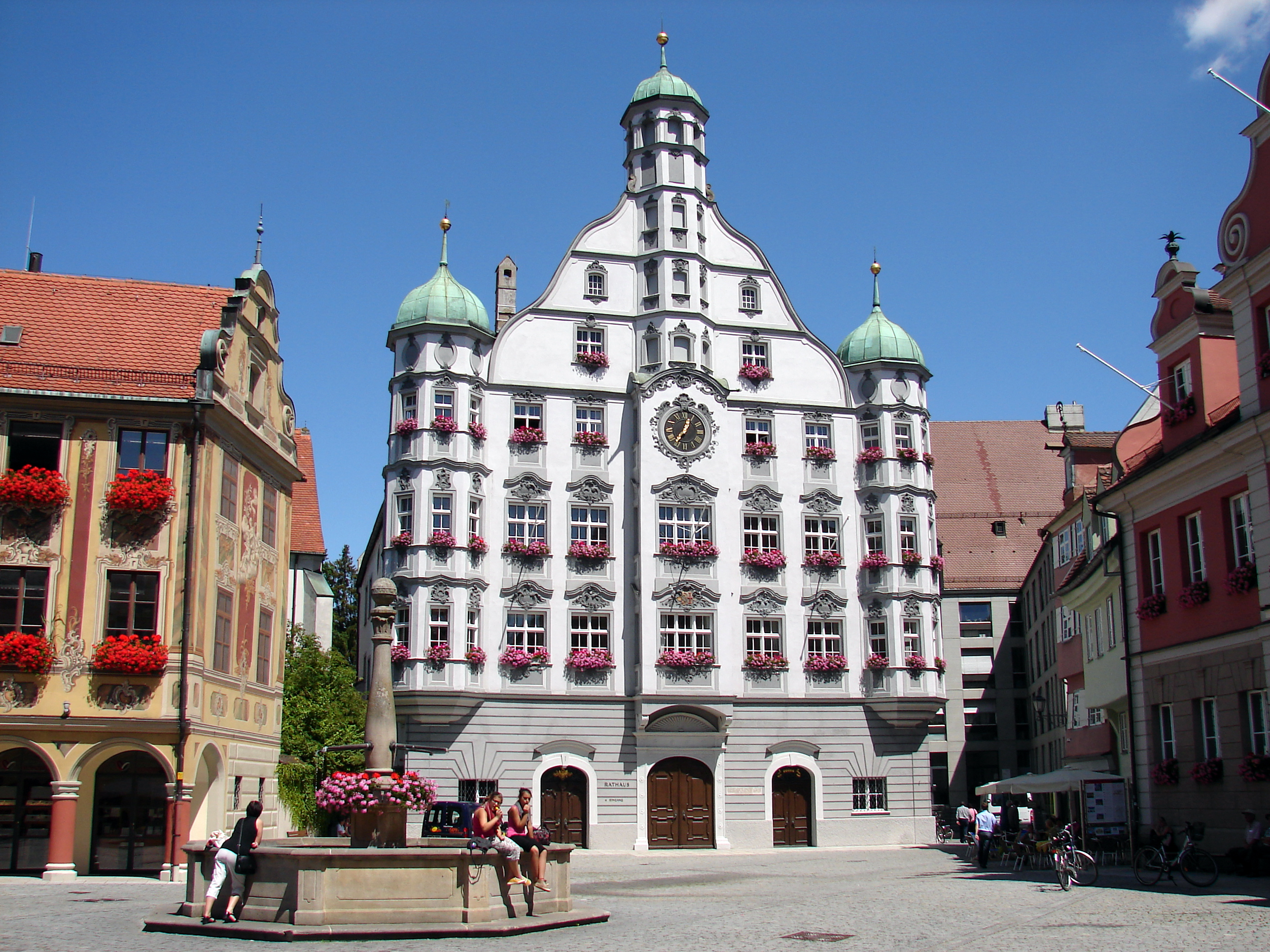 Memminger Rathaus